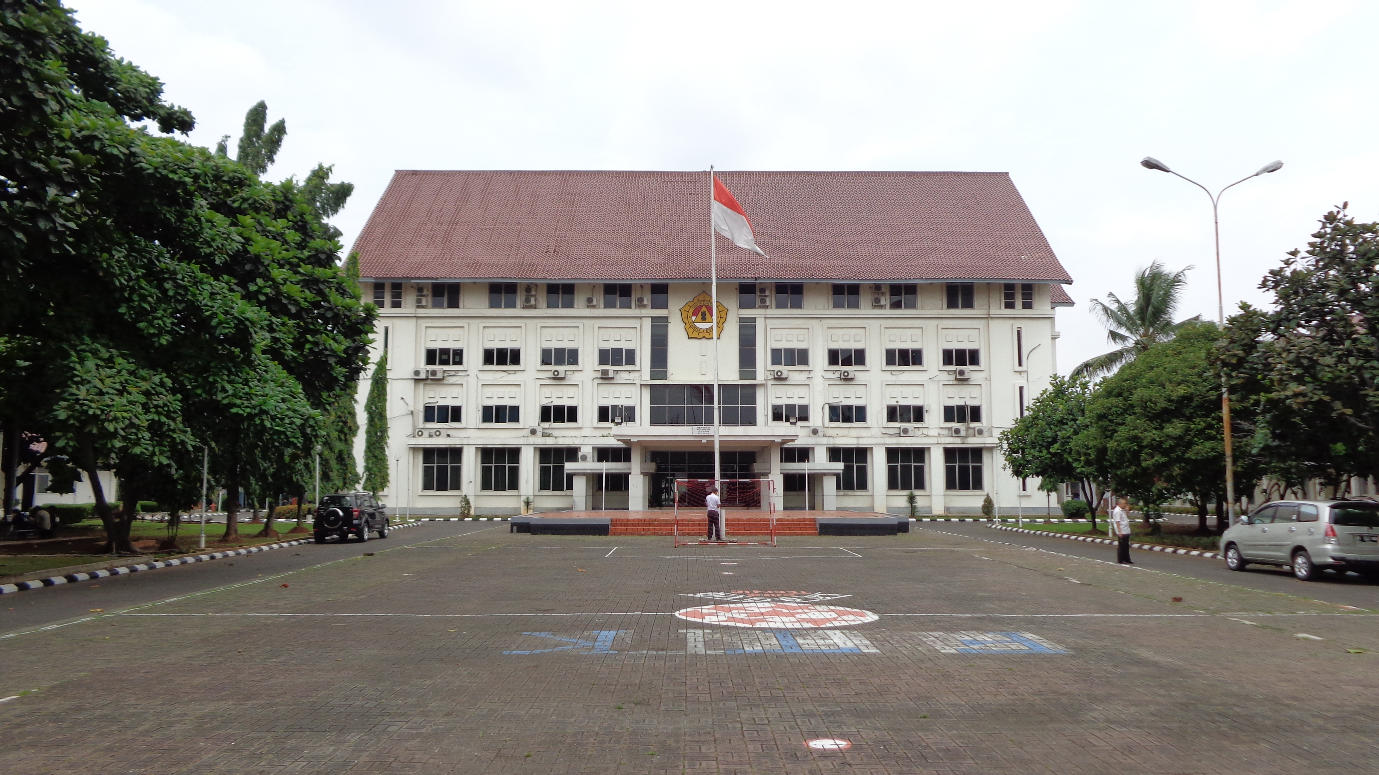 ダルマプルサダ大学本部管理棟